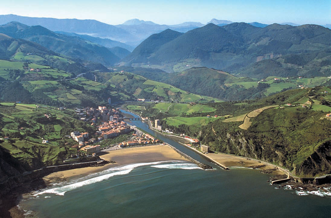 Debako ikuspegia